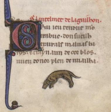 Bibliothèque nationale de France, manuscrit 12474, folio 246r, détail concernant le troubadour Lantelmet d'Aiguillon (début d'un sirventès avec le nom du troubadour).